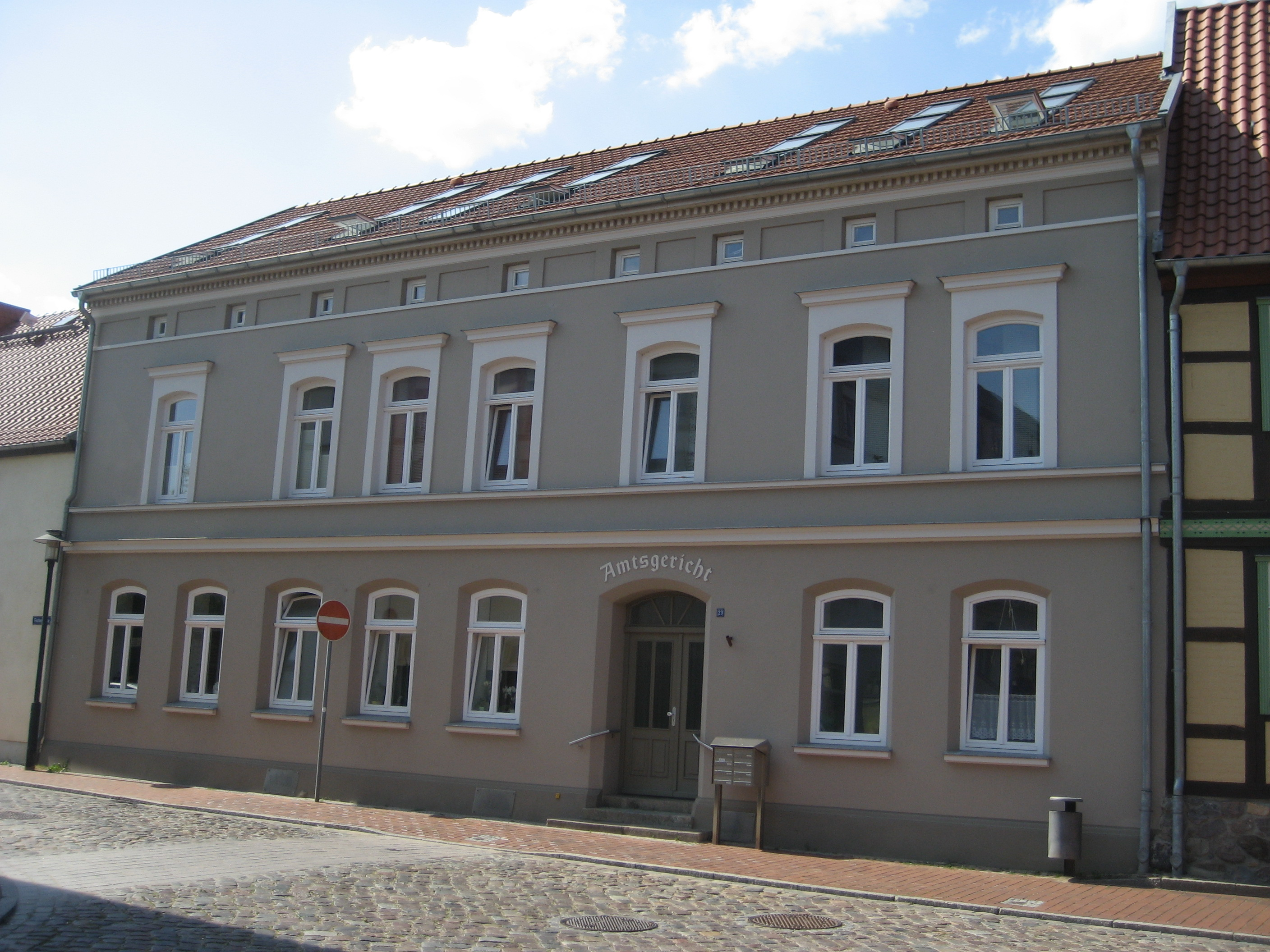 Das Gebäude des ehemaligen Amtsgerichts Sternberg in der Luckower Straße 23.